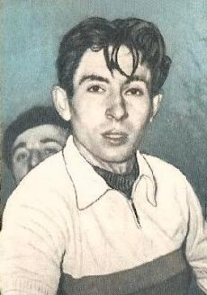 André Dufraisse vers 1955, 'Sprint 71', Panini figurina colorado n°236, p.49.